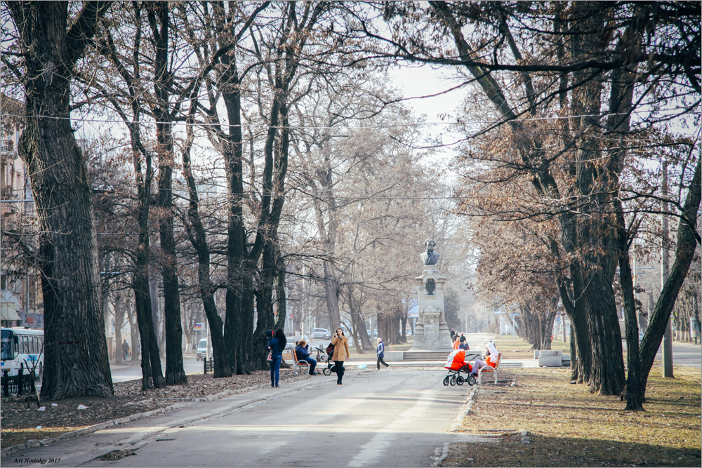 весняний проспект